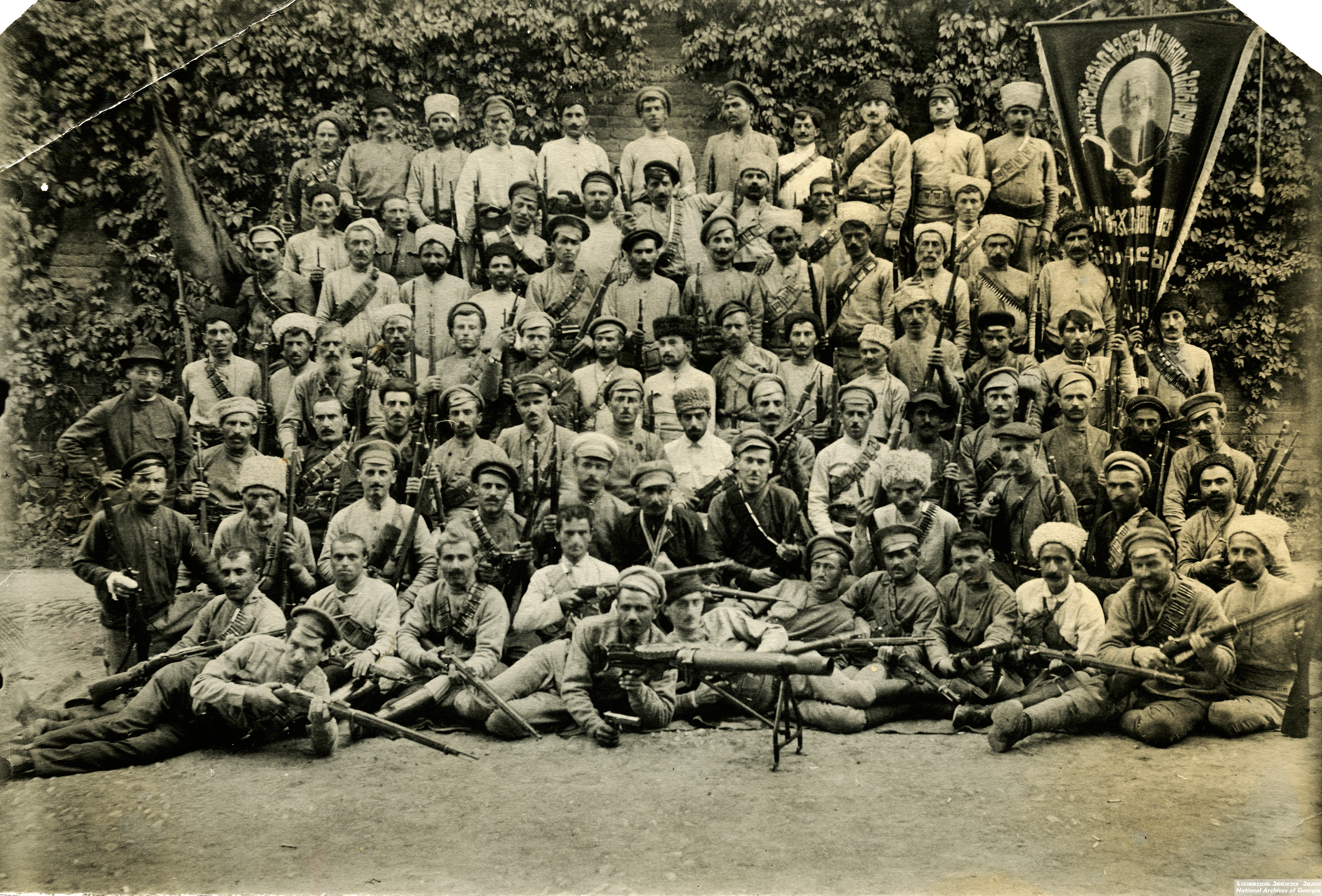 სახალხო გვარდიის თბილისის საგანგებო ბატალიონი. 1918 წ.